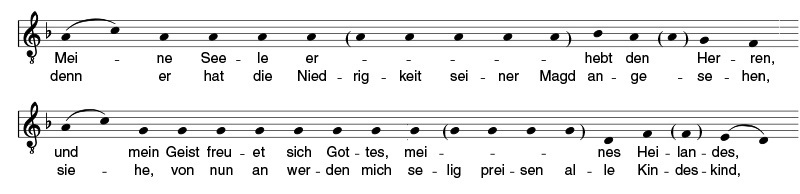 Anfang des Magnificat (Lutherübersetzung) mit dem 9. Psalmton